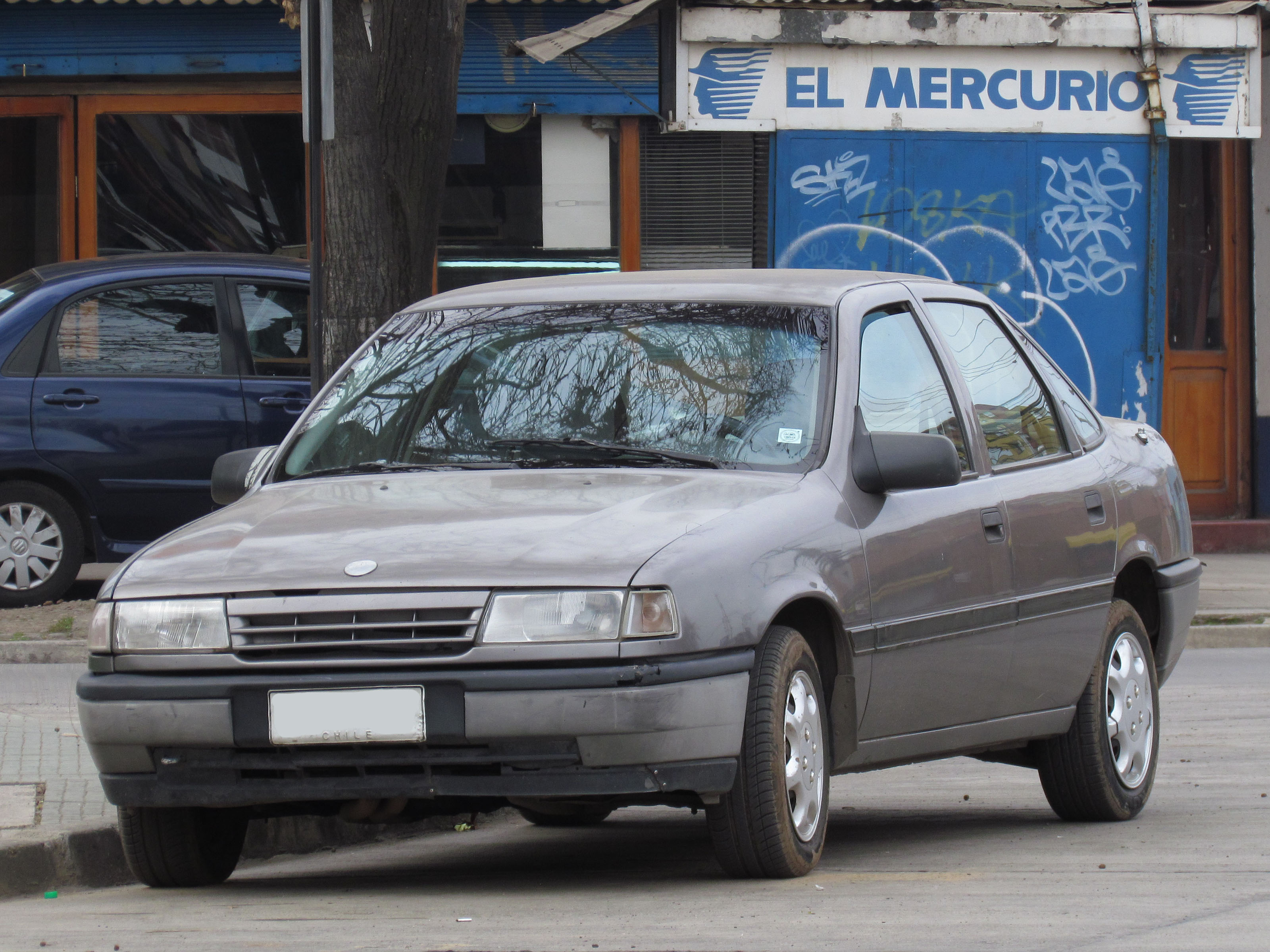 Opel Vectra 1.8 GL 1992